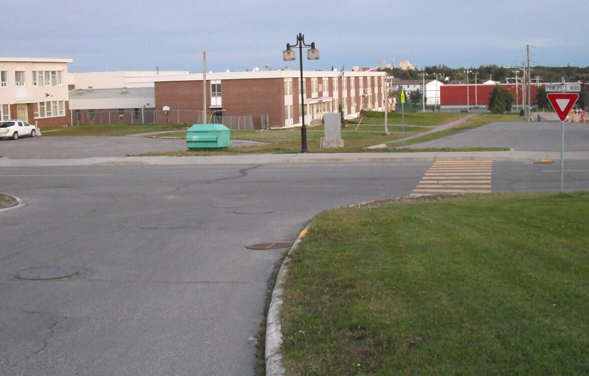 Rare panneau de cédez-le-passage à une intersection à angle droite au Québec, Lebel-sur-Quévillon.